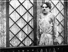 Charlie Chaplin en una escena del filme Caught in the Rain (1914).